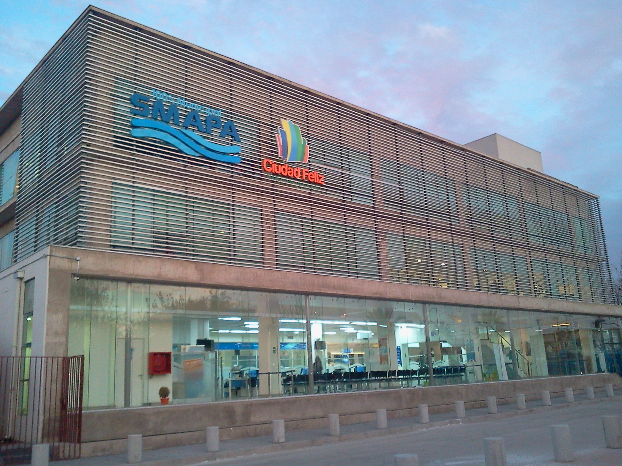 La fachada del edificio corporativo del Servicio Municipal de Agua Potable y Alcantarillado (SMAPA) de la comuna de Maipú, inaugurado en mayo de 2016 en avenida 5 de Abril 260.